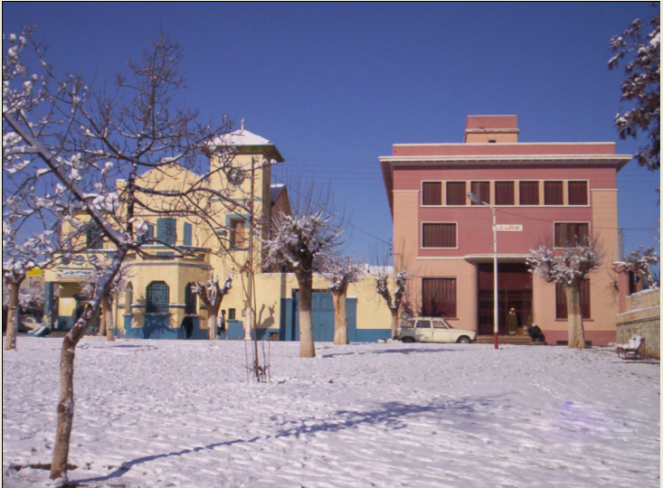 قاعة الحفلات و مكتب البريد